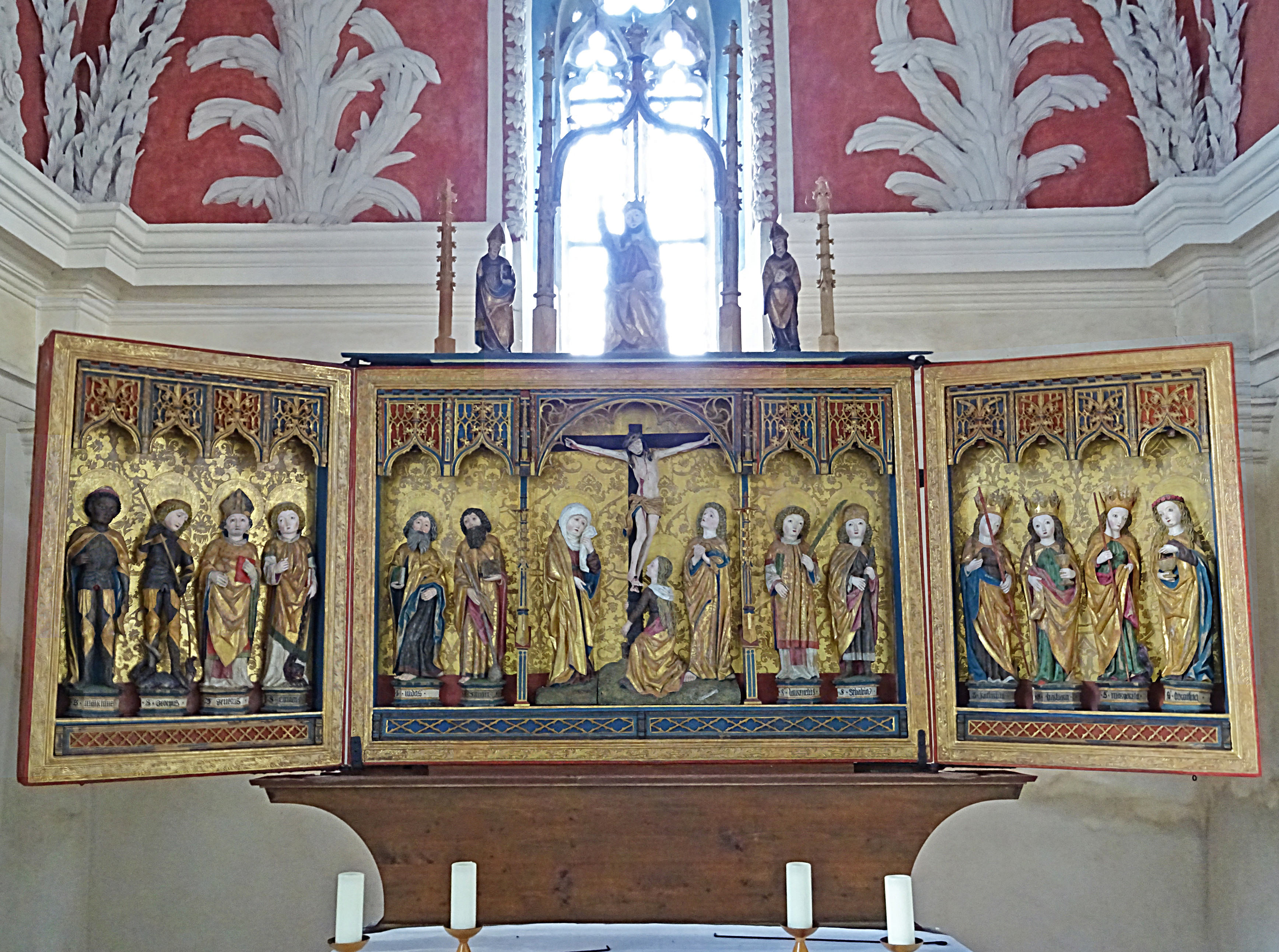 Wandelaltar vom Meister des Schwarzaer Altars (1487) in der Kirche St. Simon und Juda (Neunhofen), zweite Wandlung - vollständig geöffnet